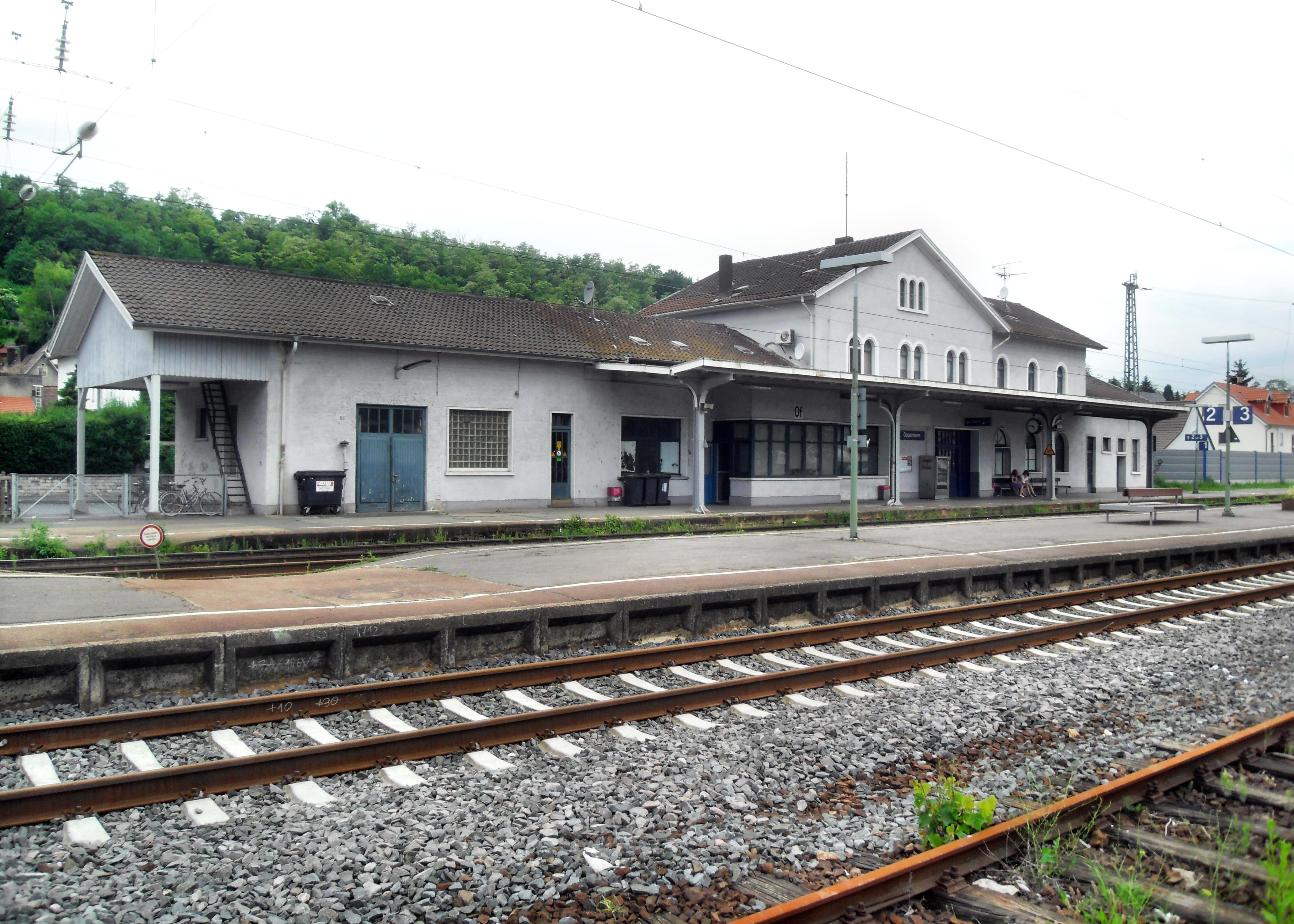 Das Empfangsgebäude des Bahnhofs Oppenheim in Rheinhessen in Rheinland-Pfalz (Deutschland) von den Gleisanlagen aus